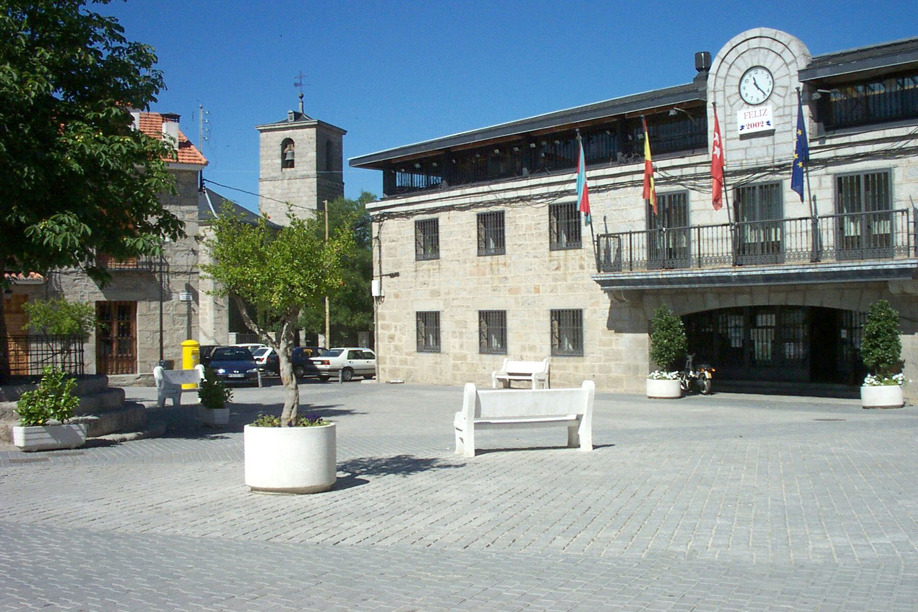 Ayuntamiento, plaza y campanario de iglesia en Colmenarejo.